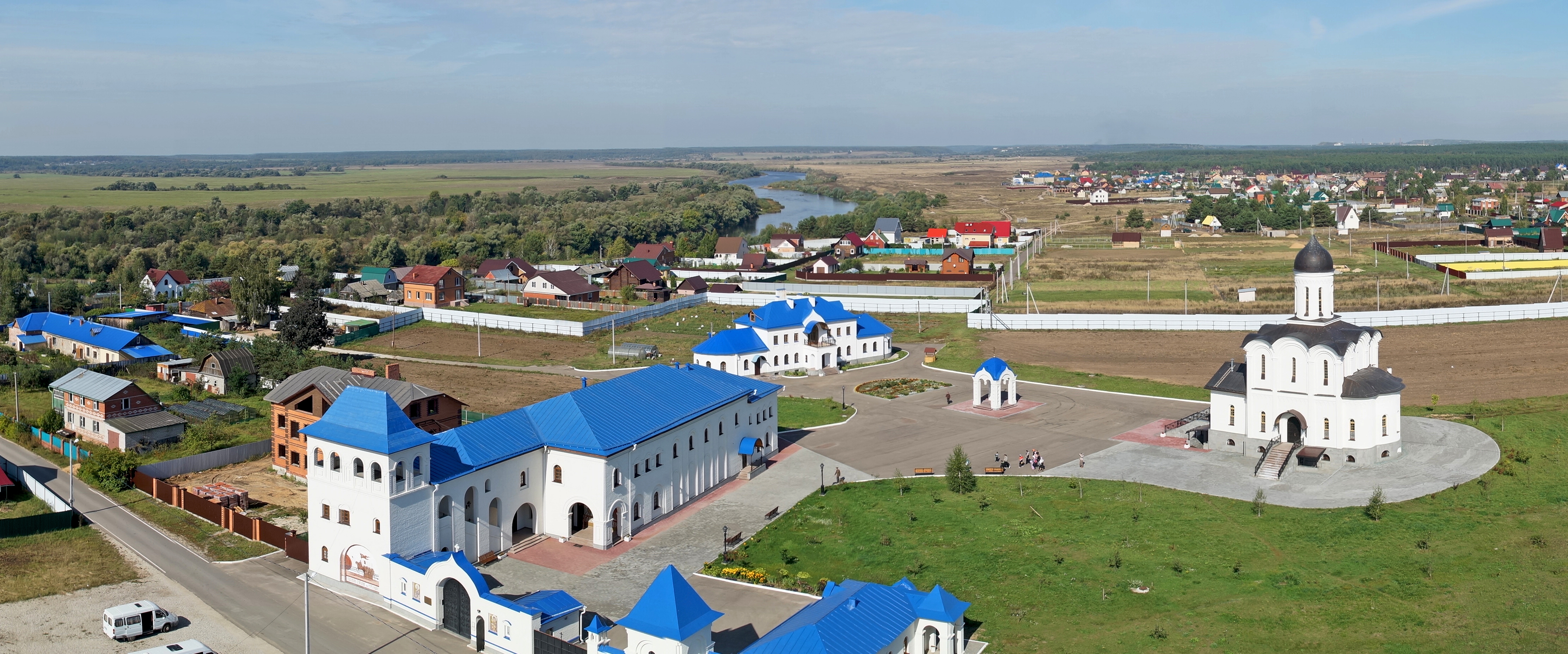 Владимирский скит монастыря "Калужская Свято-Тихонова пустынь" с высоты птичьего полёта.